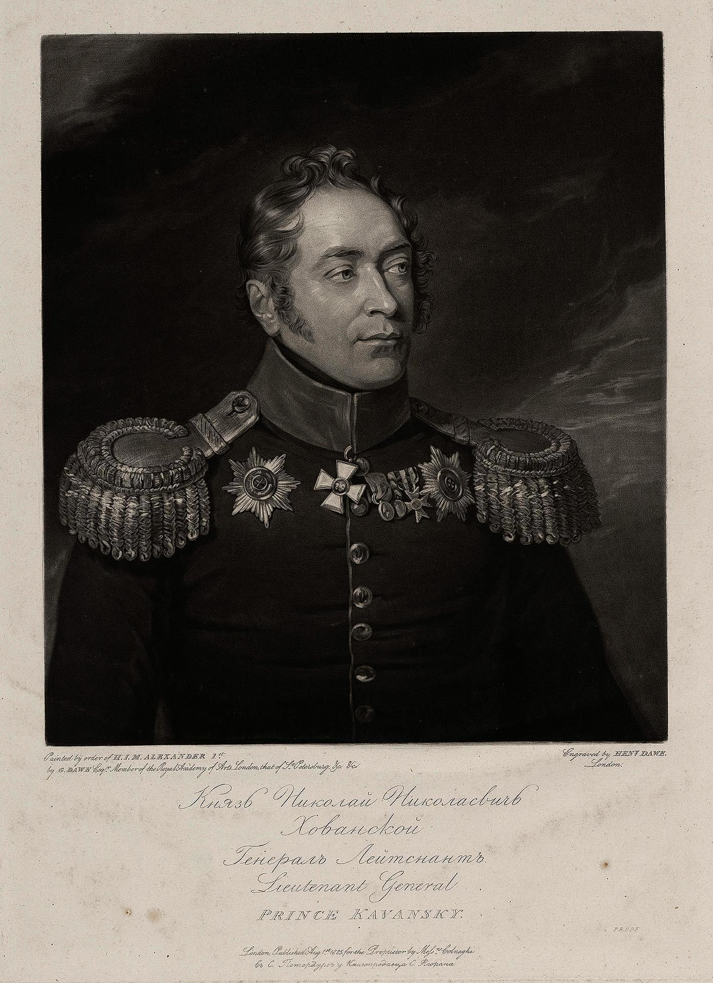 Портрет генерала князя Н. Н. Хованского